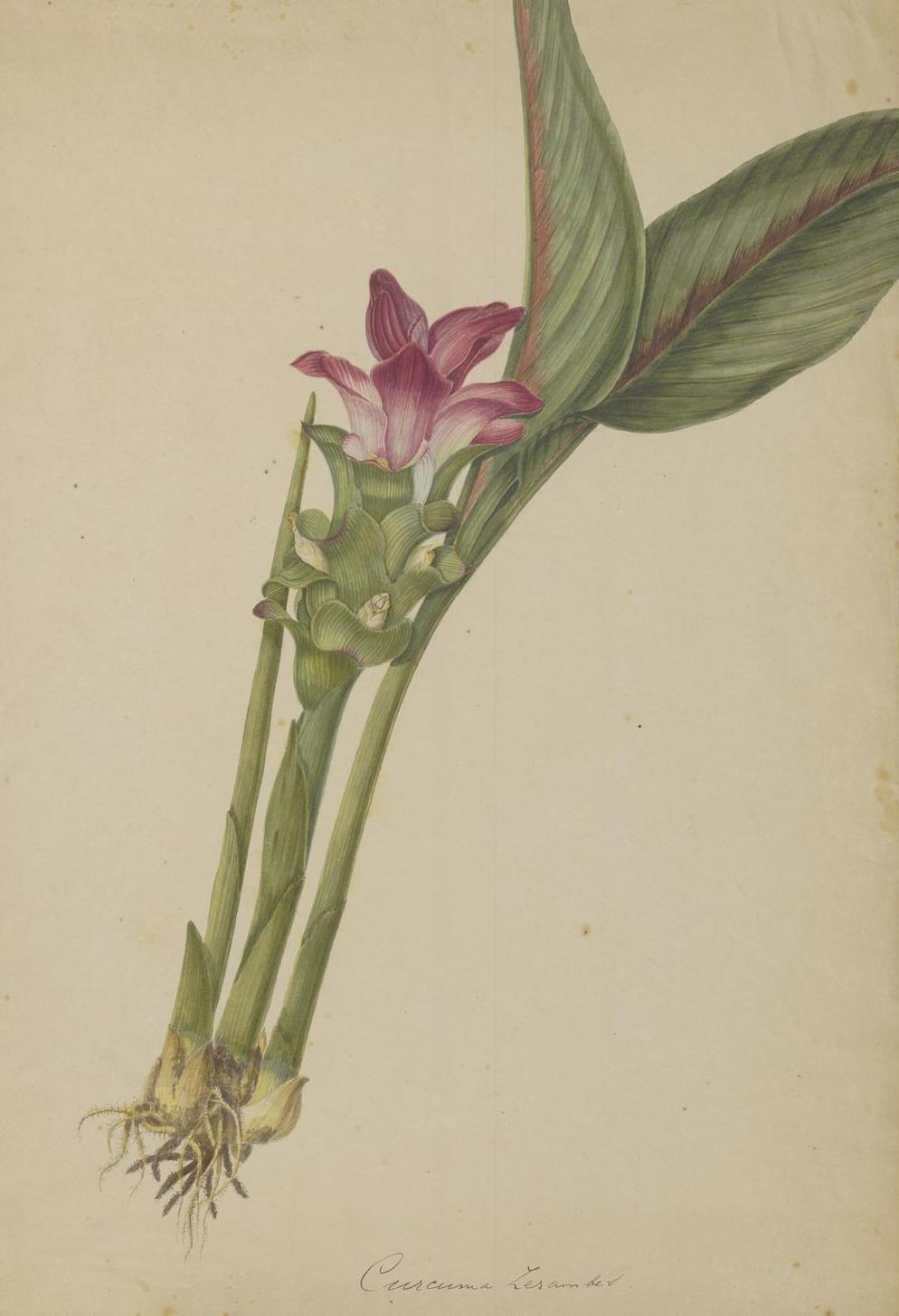 Curcuma zerumbet